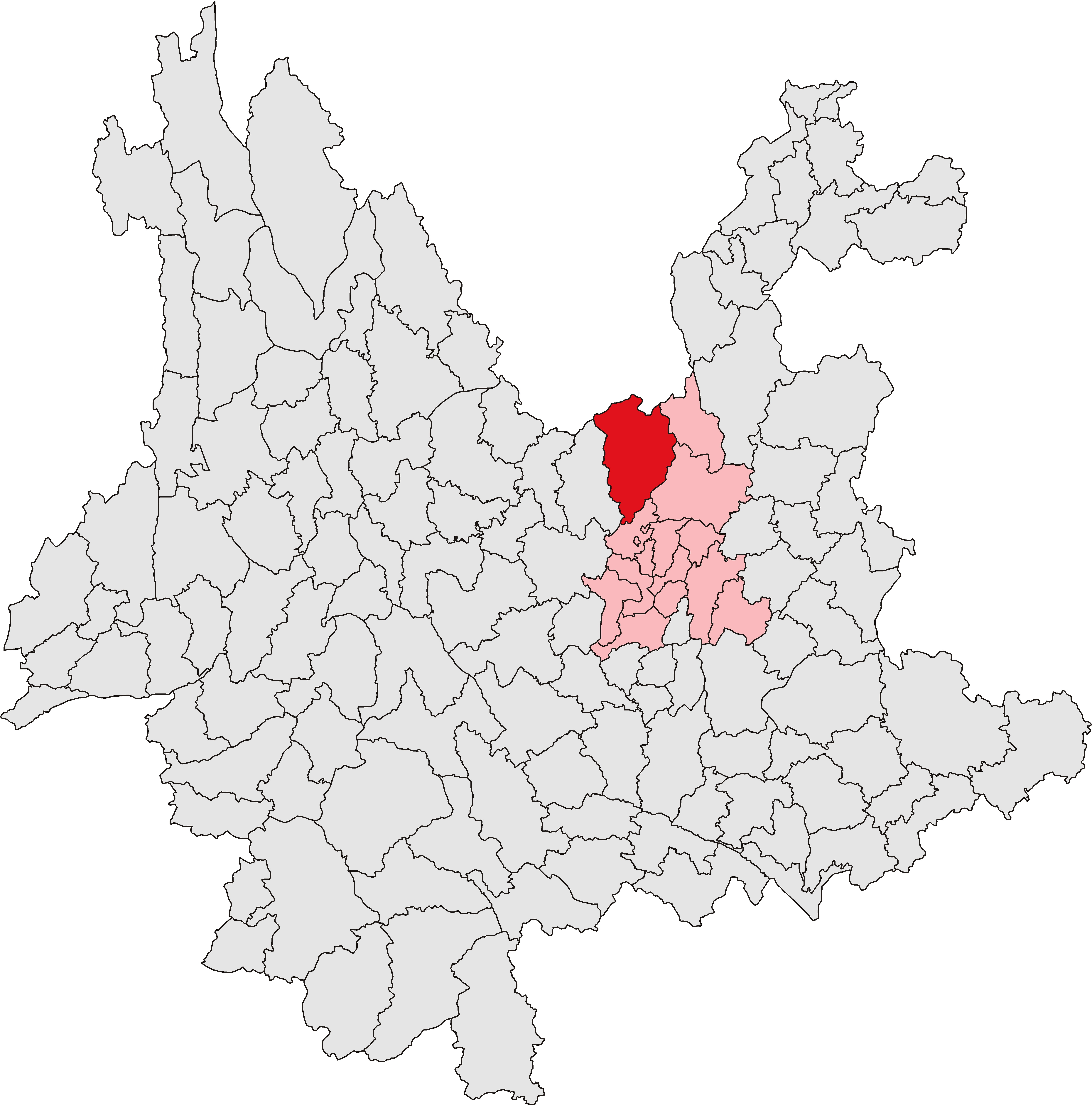 中文（中国大陆）: 禄劝彝族苗族自治县位置图